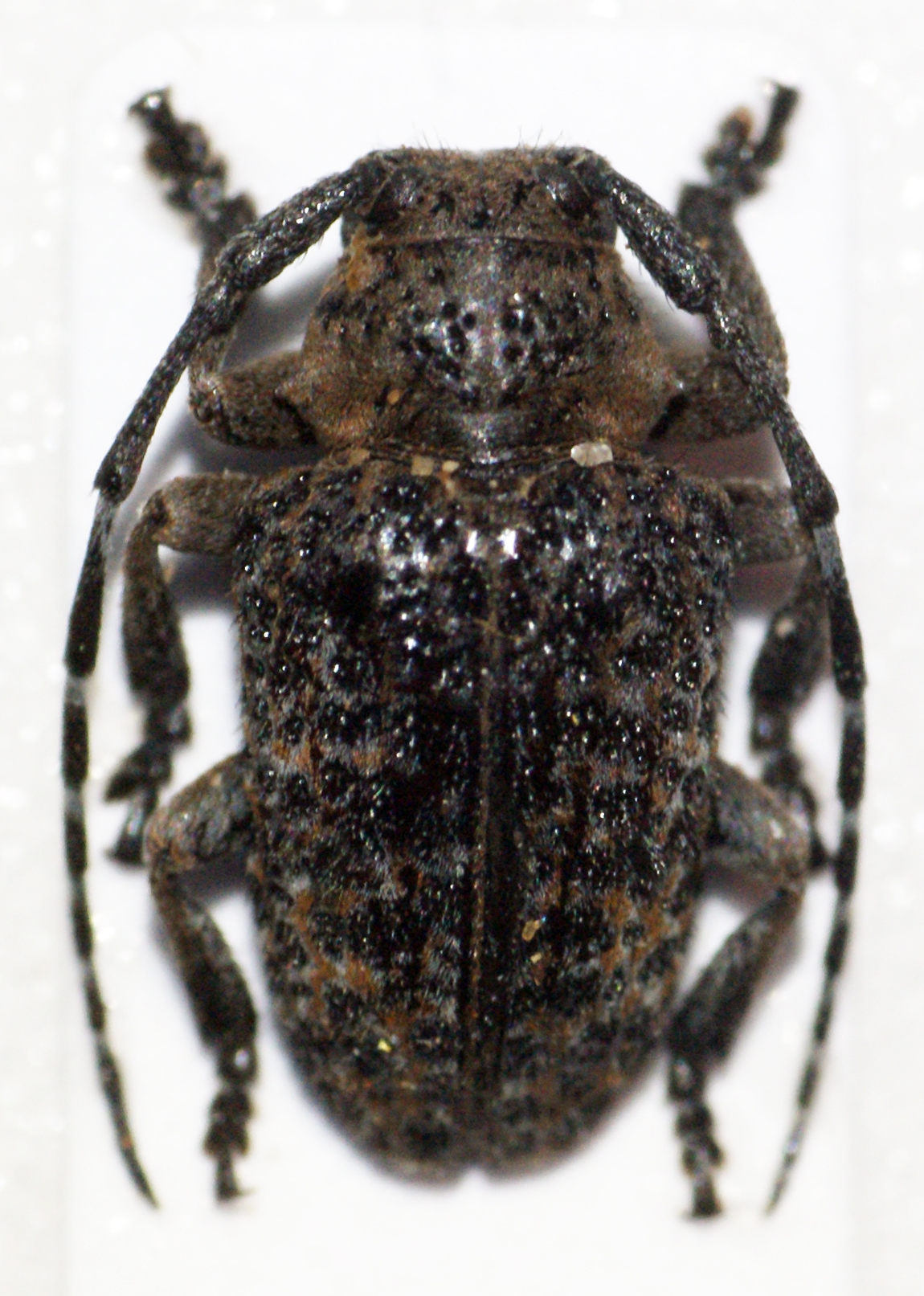 Fåhraeus,1872 Sex: ? Data: 12-01-13 - Litembo Village - Mbinga District - Tanzania Size: ?